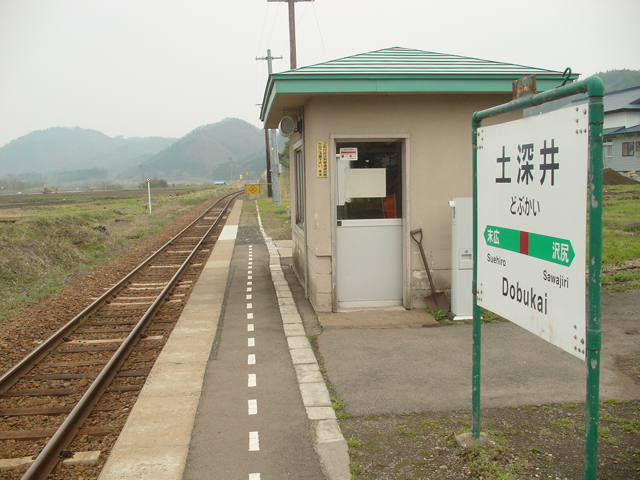 （土深井駅）